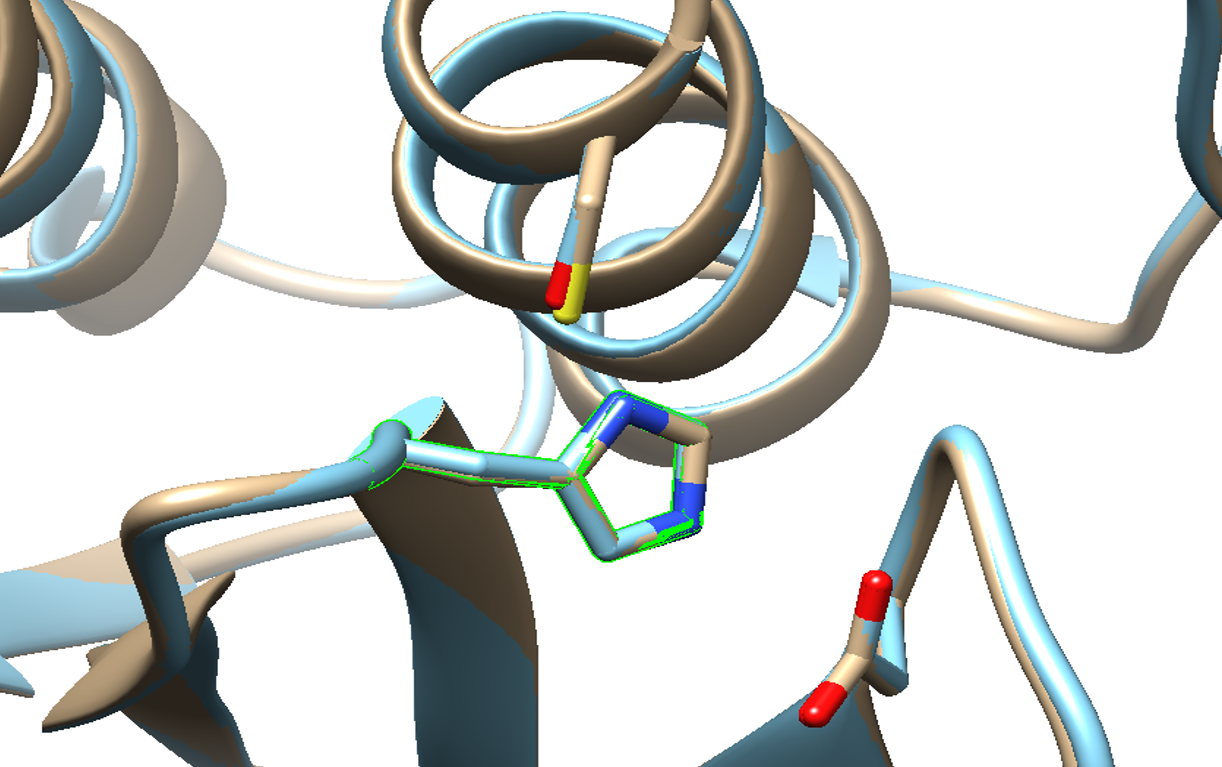 El sitio catalítico de SENP1 se conforma de tres aminoácidos una Cys 602, His 533 y Asp 550.